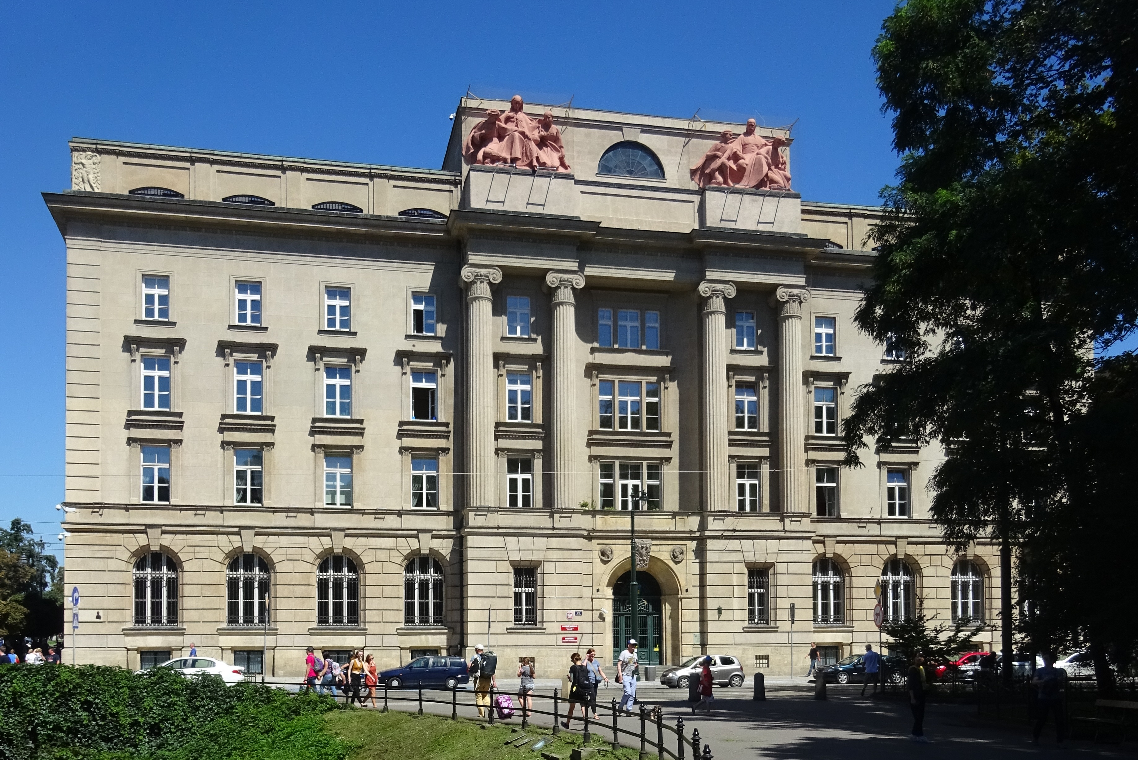 Gmach Narodowego Banku Polskiego w Krakowie, przy ulicy Basztowej 20. Po remoncie, 2018.